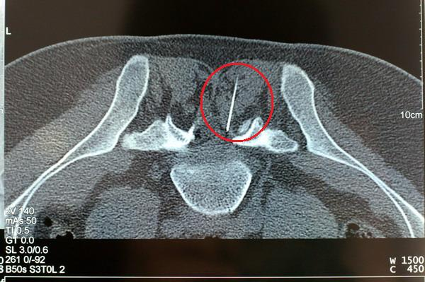 Lagekontrolle mittels CT bei einer PRT. Transligamentärer Zugang.